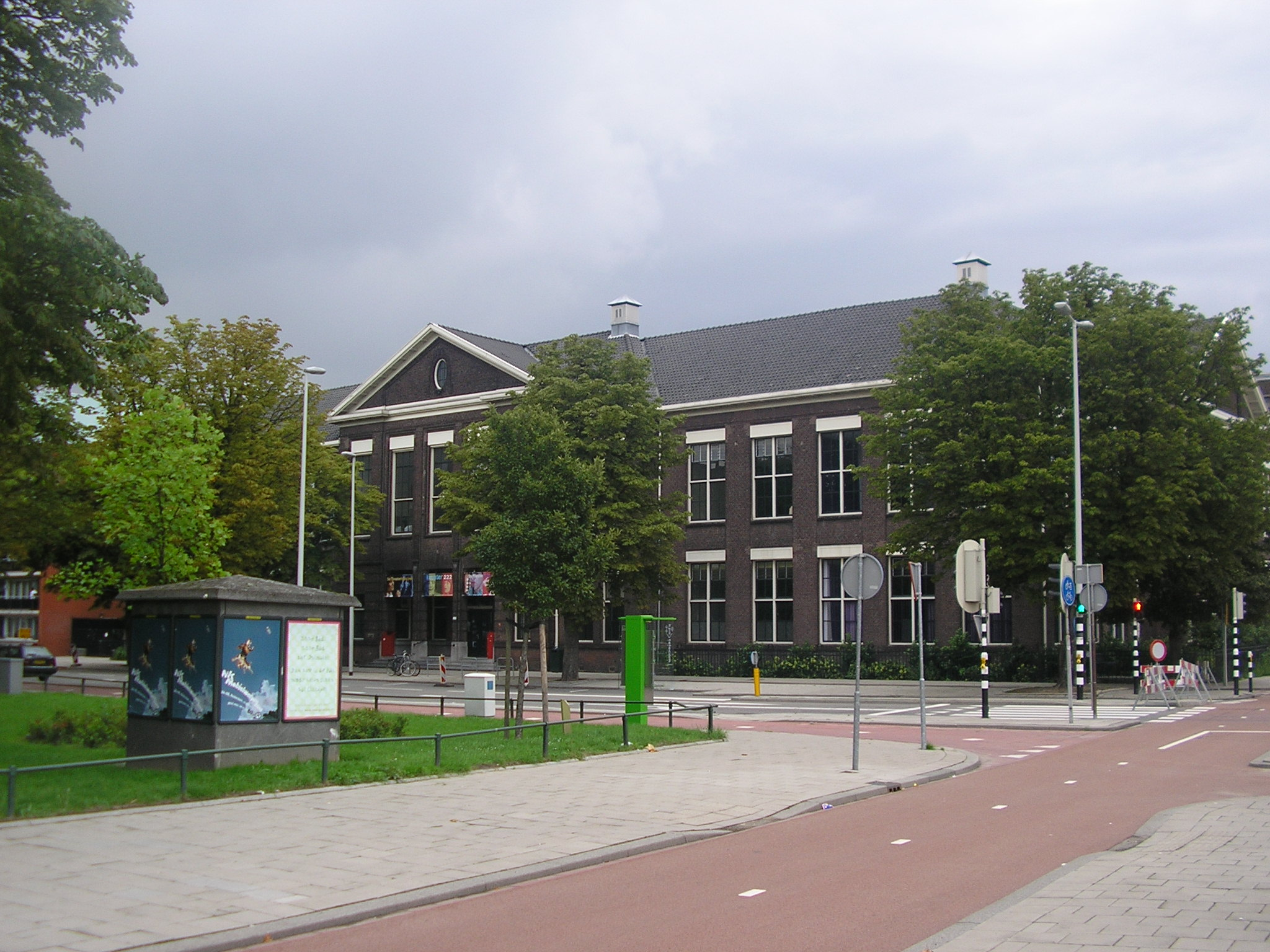 Jeugdtheaterschool aan de Pieter de Hoochweg. Voorheen was de Nederlands(ch)e Economische Handelsschool. nu bekend onder de naam Erasmus Universiteit en Rotterdamse Conservatorium.